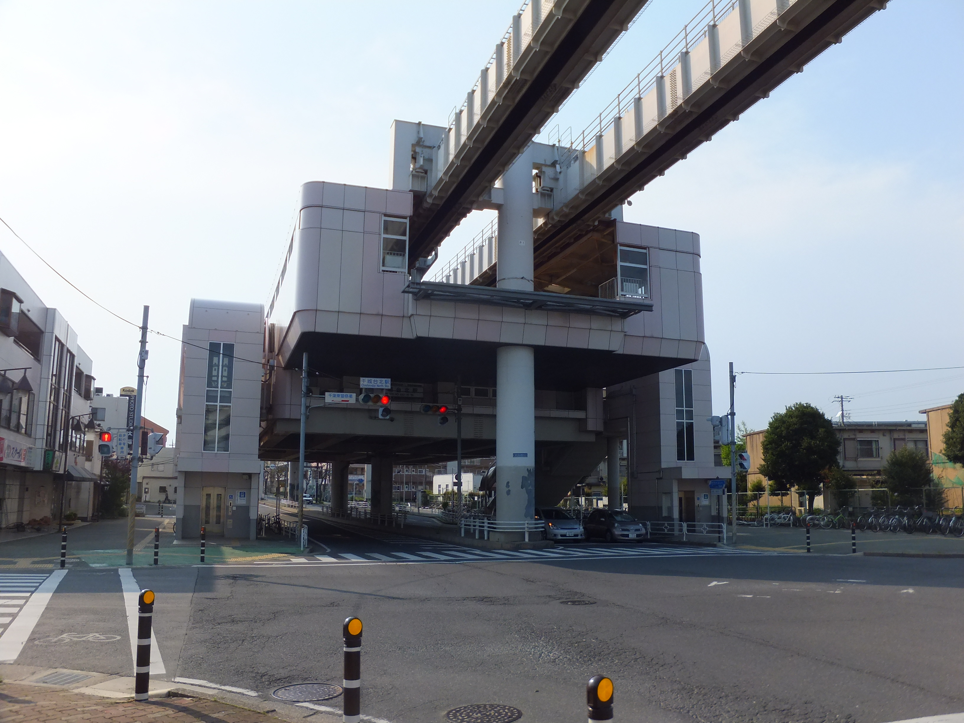 千葉都市モノレール千城台北駅